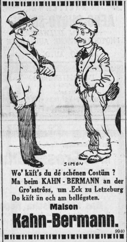 Publicité de la "maison Kahn-Bermann" (Au Drapeau Luxembourgeois") dans le "Escher tageblatt", édition du 04.04.1931